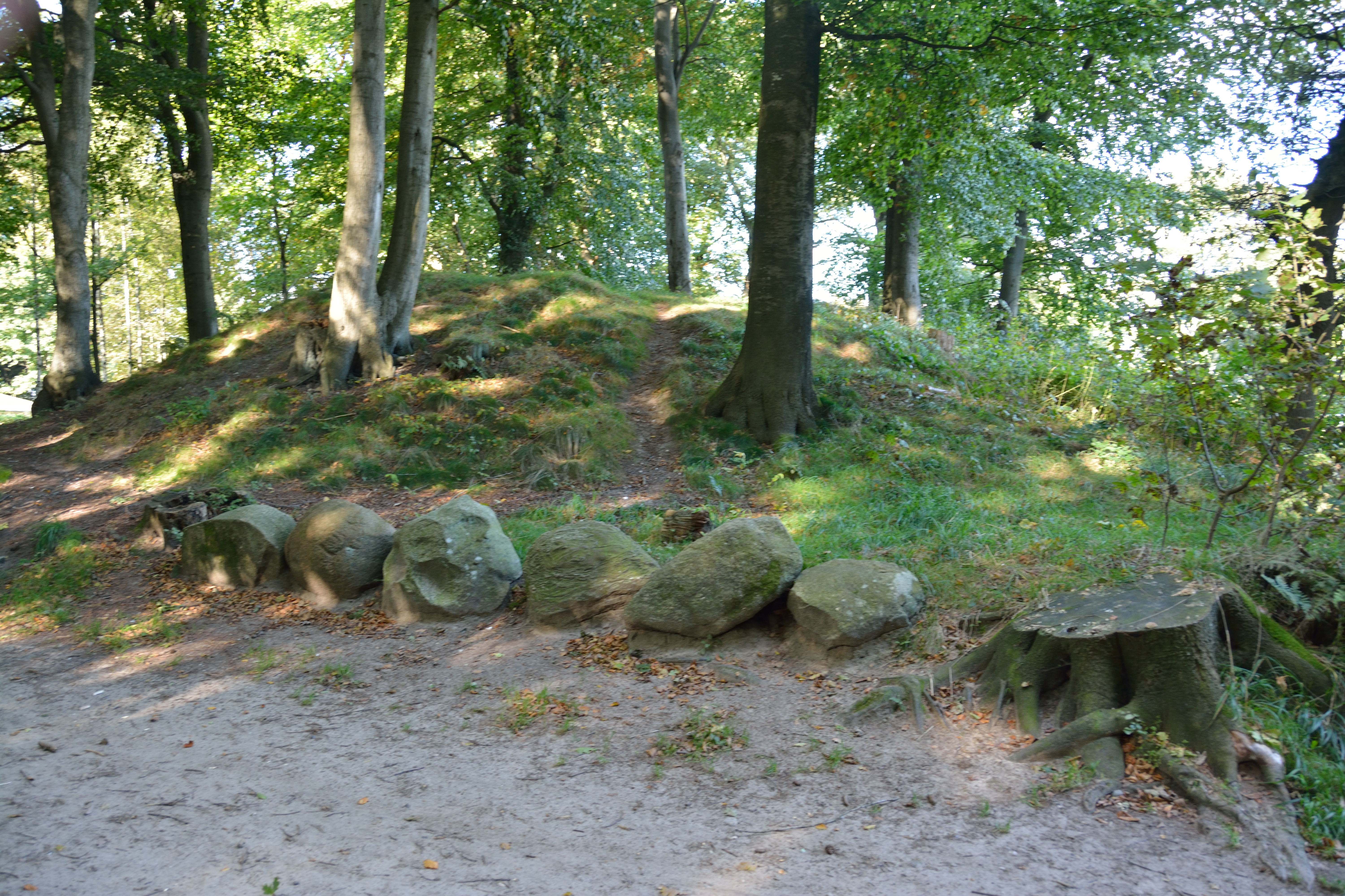 Das Hügelgräberfeld "Hademarscher Berge" liegt in Hanerau-Hademarschen direkt an den Sportplätzen. Von den ehemals bekannten 30 Grabhügeln sind heute noch fünf erkennbar. Ein Hügel wurde bisher geöffnet, das Grab ist der Öffentlichkeit zugänglich. Zwischen zwei Hügeln wurde während der Nazi-Diktatur in Deutschland ein Flakturm errichtet, er dient heute als Ausgangspunkt für einen Klettergarten im Wald